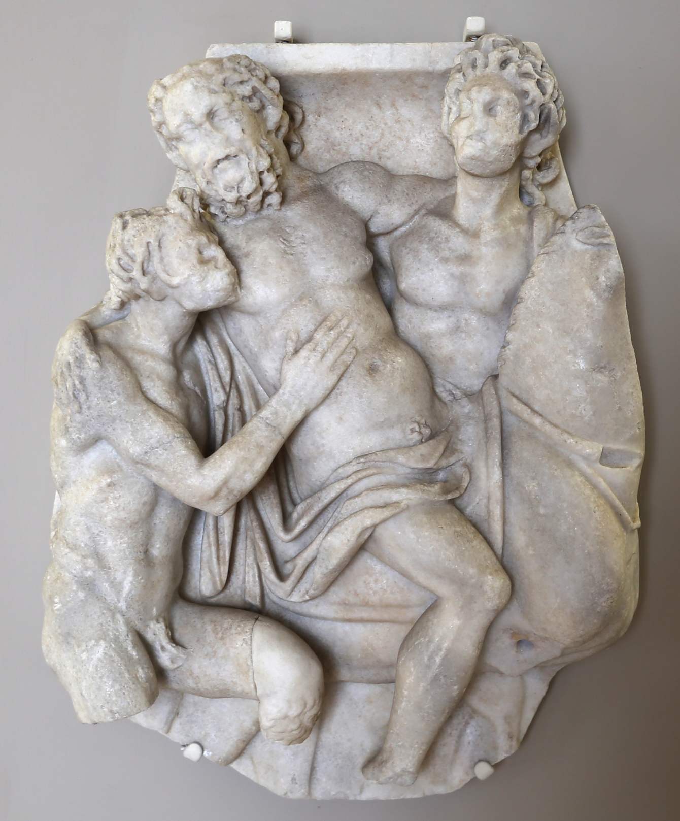 Palazzo_dei_musei_(Modena) This is a photo of a monument which is part of cultural heritage of Italy.